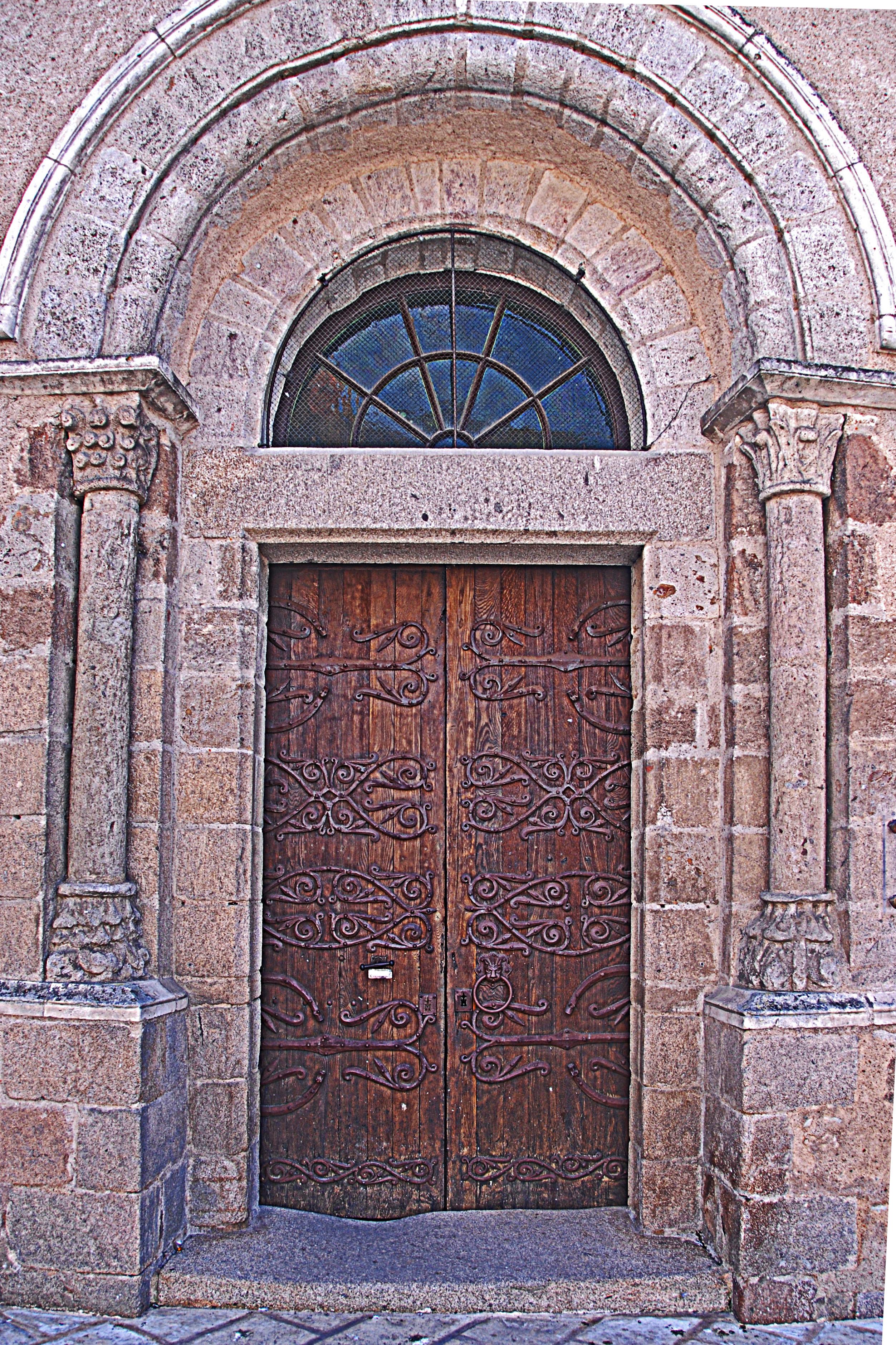 Neuvy_St.-Sépulcre, Rotunde, Hauptportal